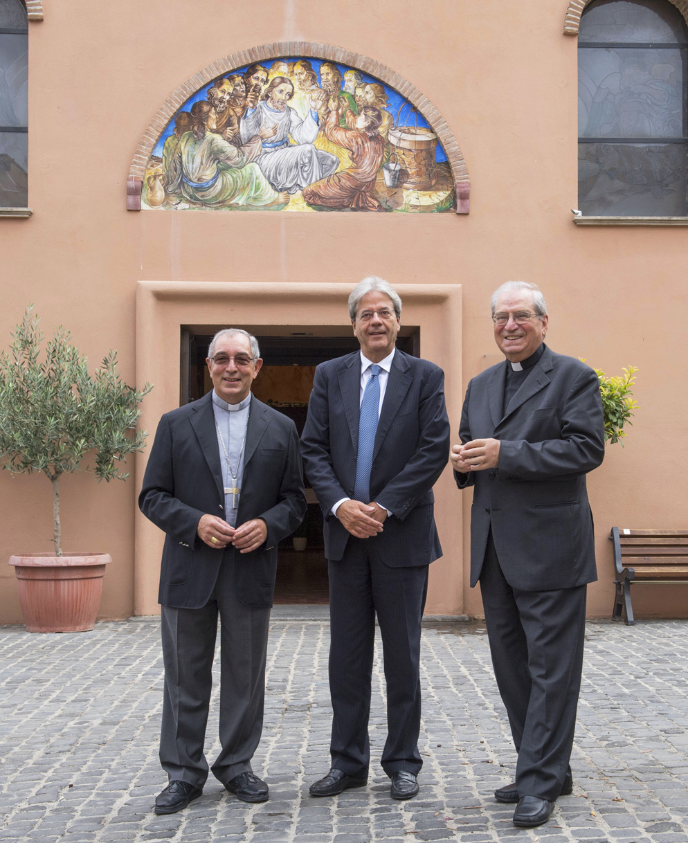 Visita del premier Gentiloni presso la Cittadella della Carità